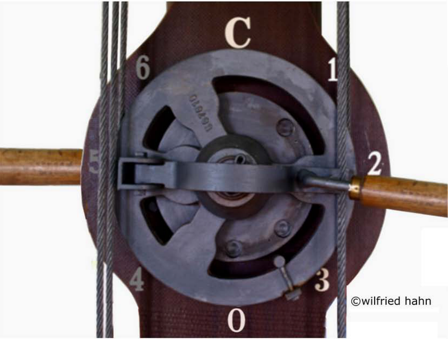 Modell der Ebene C der Steuerung des preußischen optischen Telegraphen, Station 18